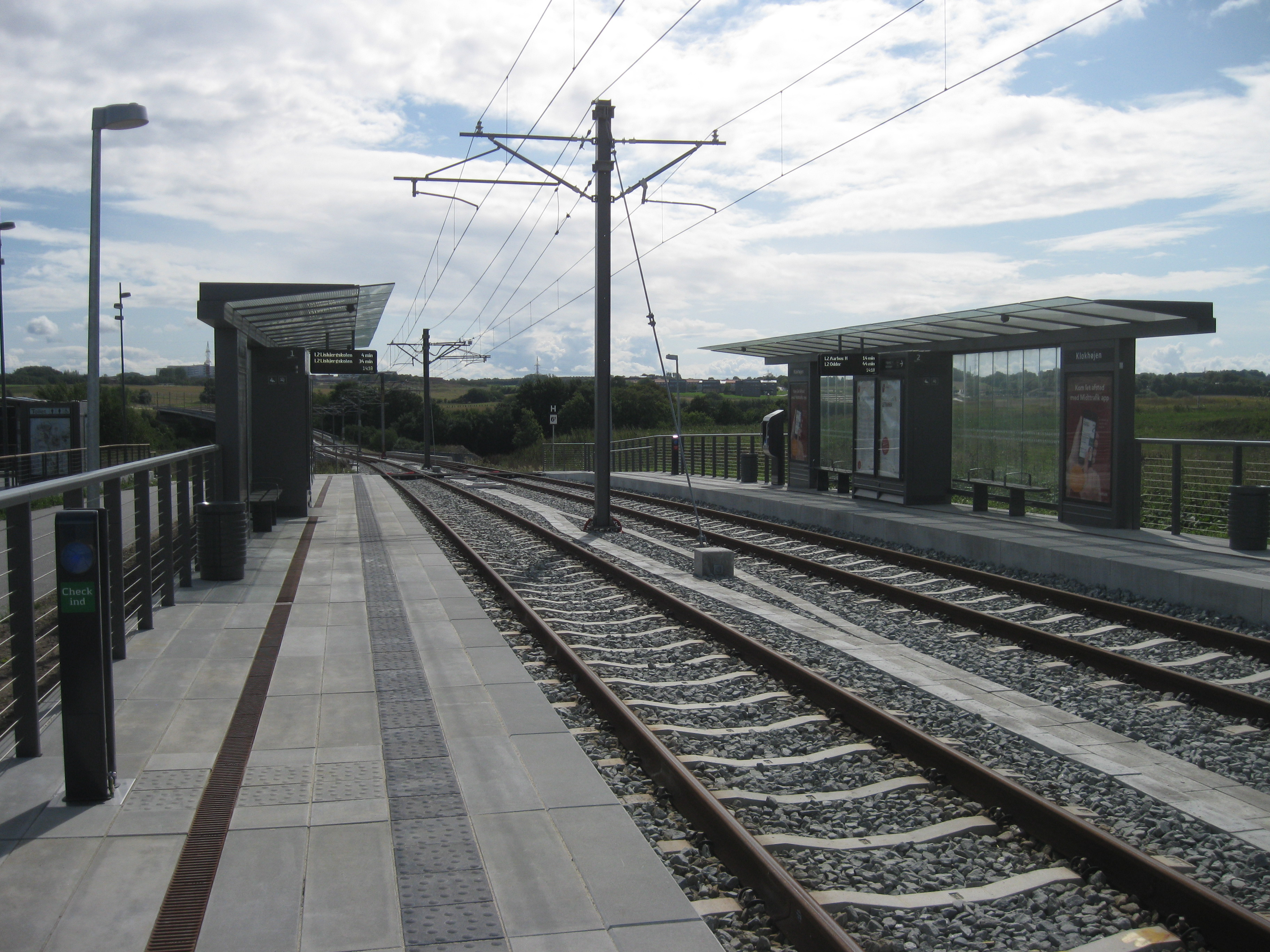 Klokhøjen Station, Århus Letbane